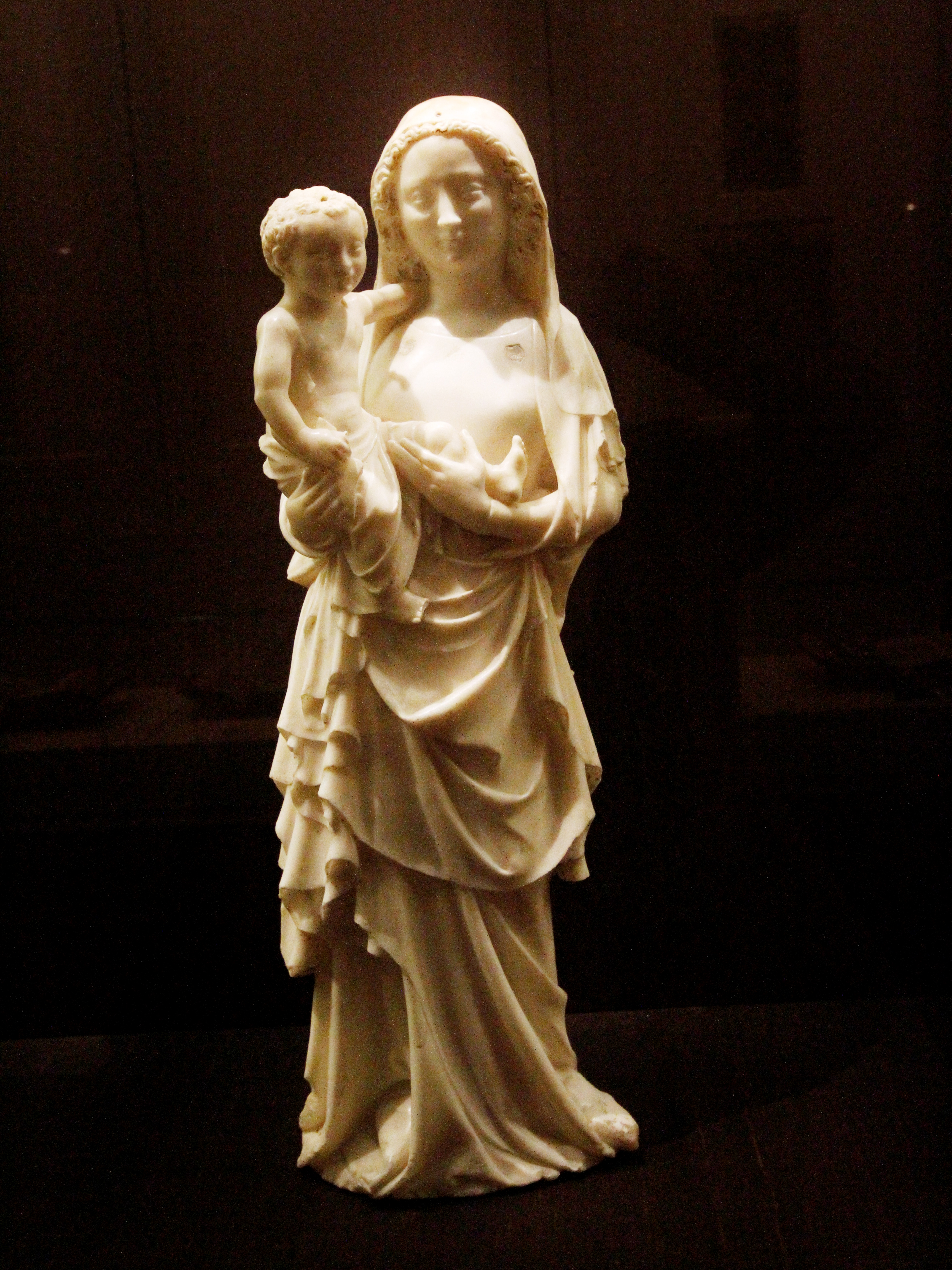 Virgem e o Menino Jesus